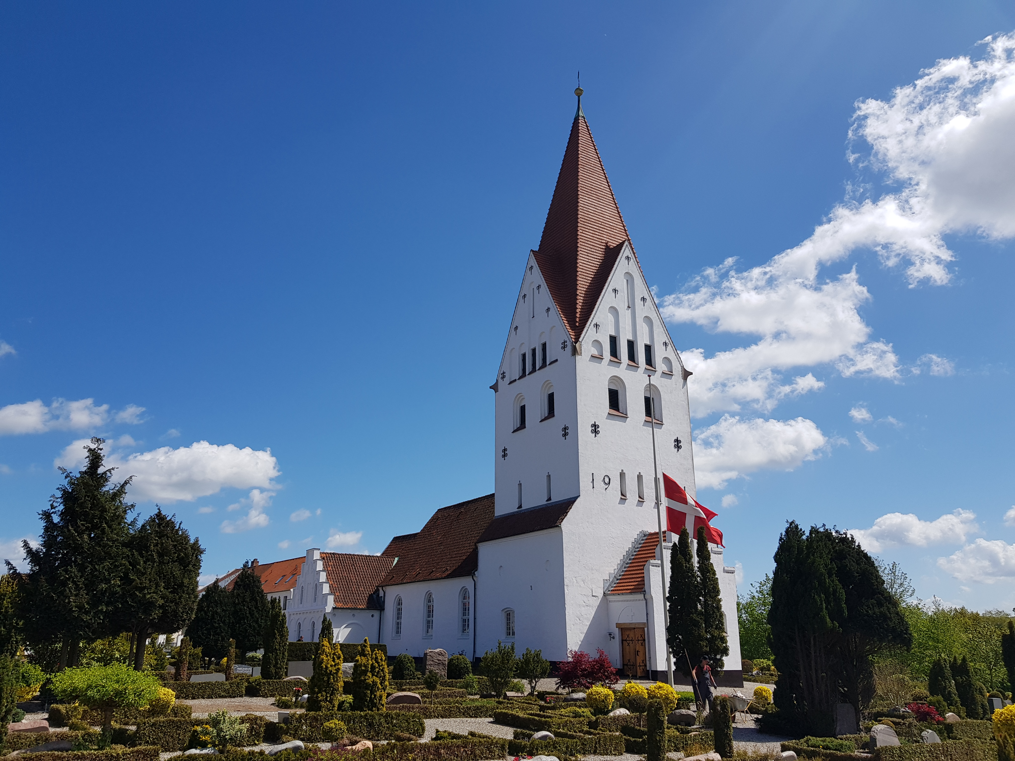 Sankt Severin/Gammel Haderslev Kirke